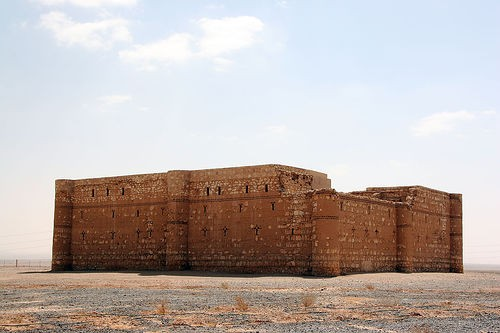 al-Kharana (Harana) Umayyad palace in Jordan.